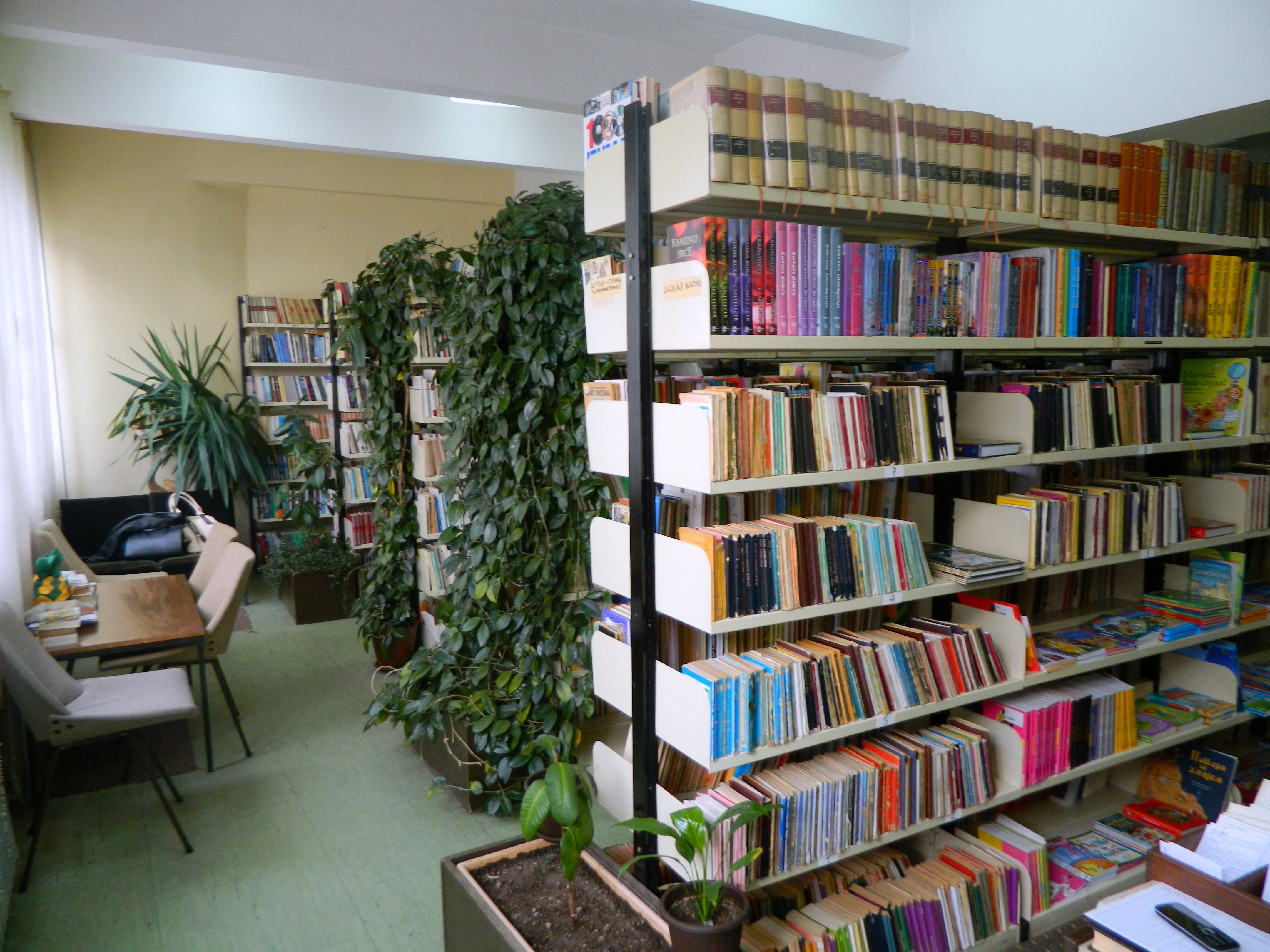 Knjižni fond biblioteke u Varvarinu